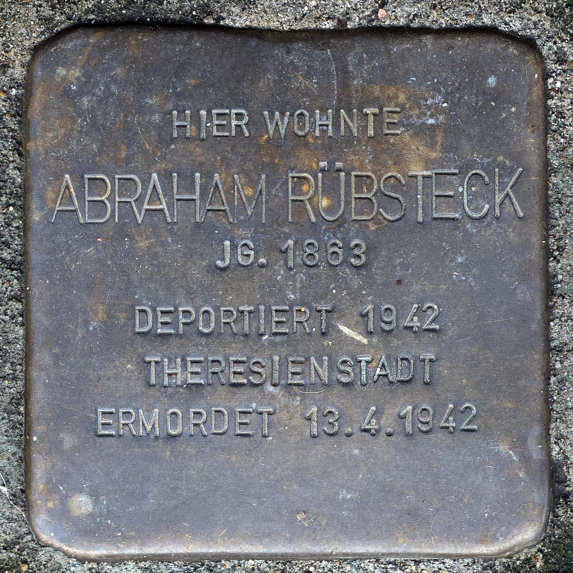 Stolperstein für Ruebsteck Abraham